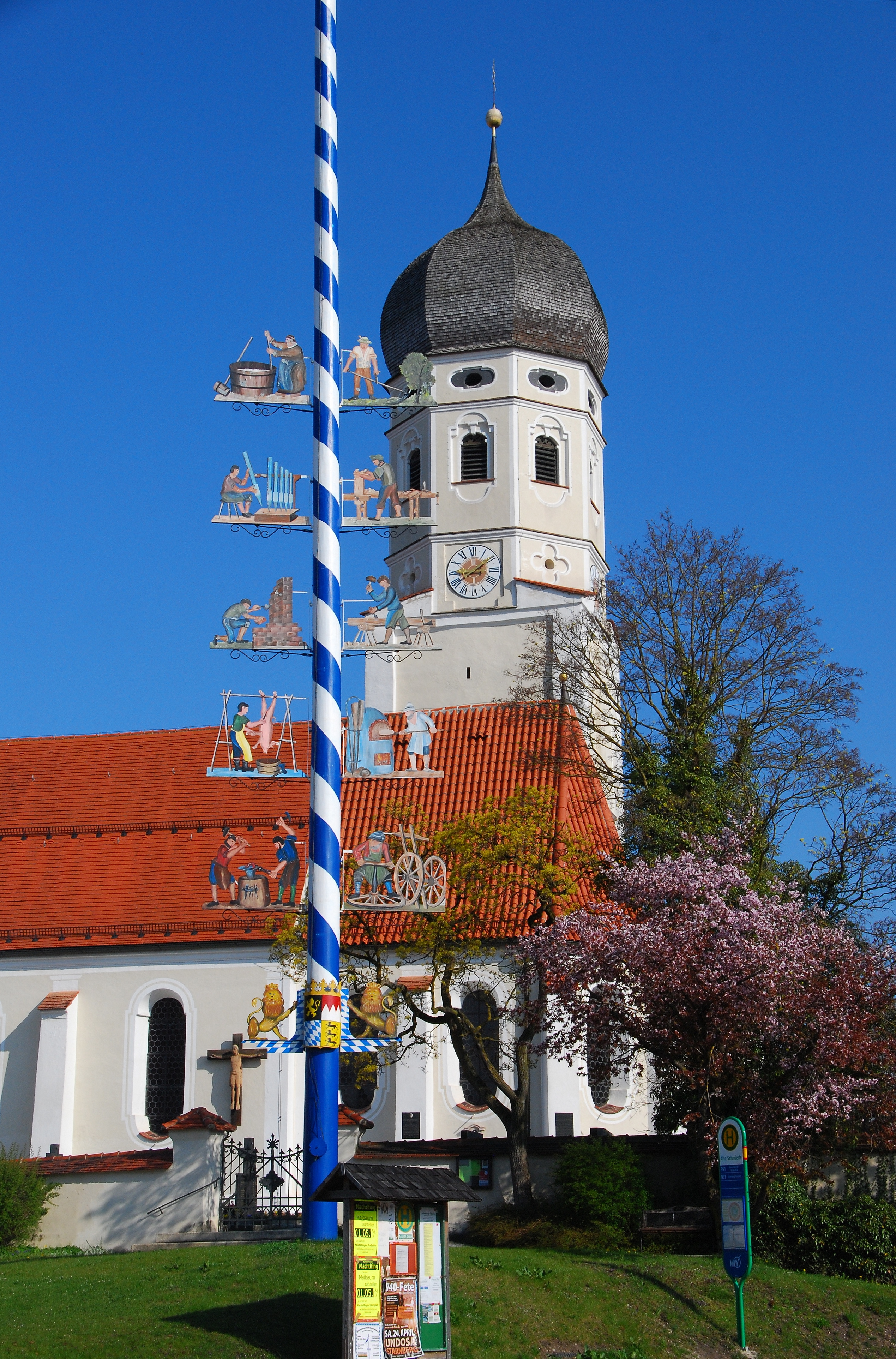 Andechs, OT Erling, Besengaßl 2, Kirche St. Vitus (St. Veit). Die katholische Pfarrkirche steht im Mittelpunkt des Ortes Erling. Der im Kern spätmittelalterliche Bau wurde 1681 barockisiert. Das Turmoberteil stammt aus der Zeit um 1635.